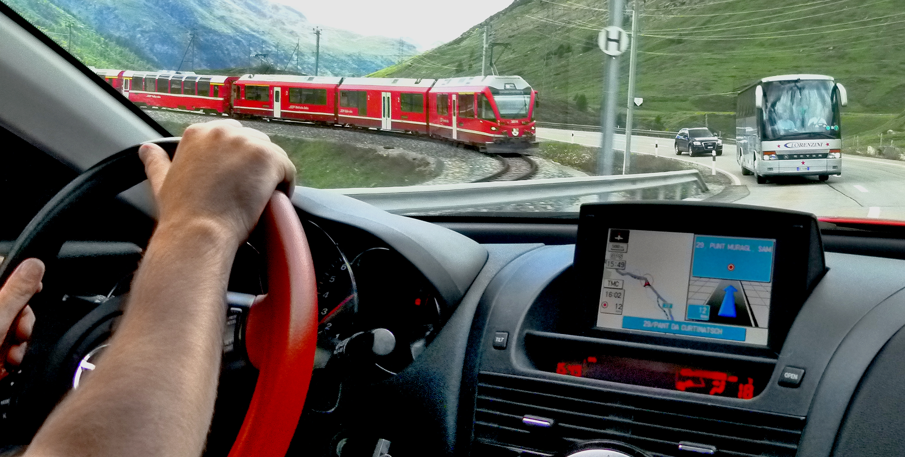 A Bernina-vasút szerelvénye, s a párhuzamos közúti forgalom (Bernina-hágó, Svájc)